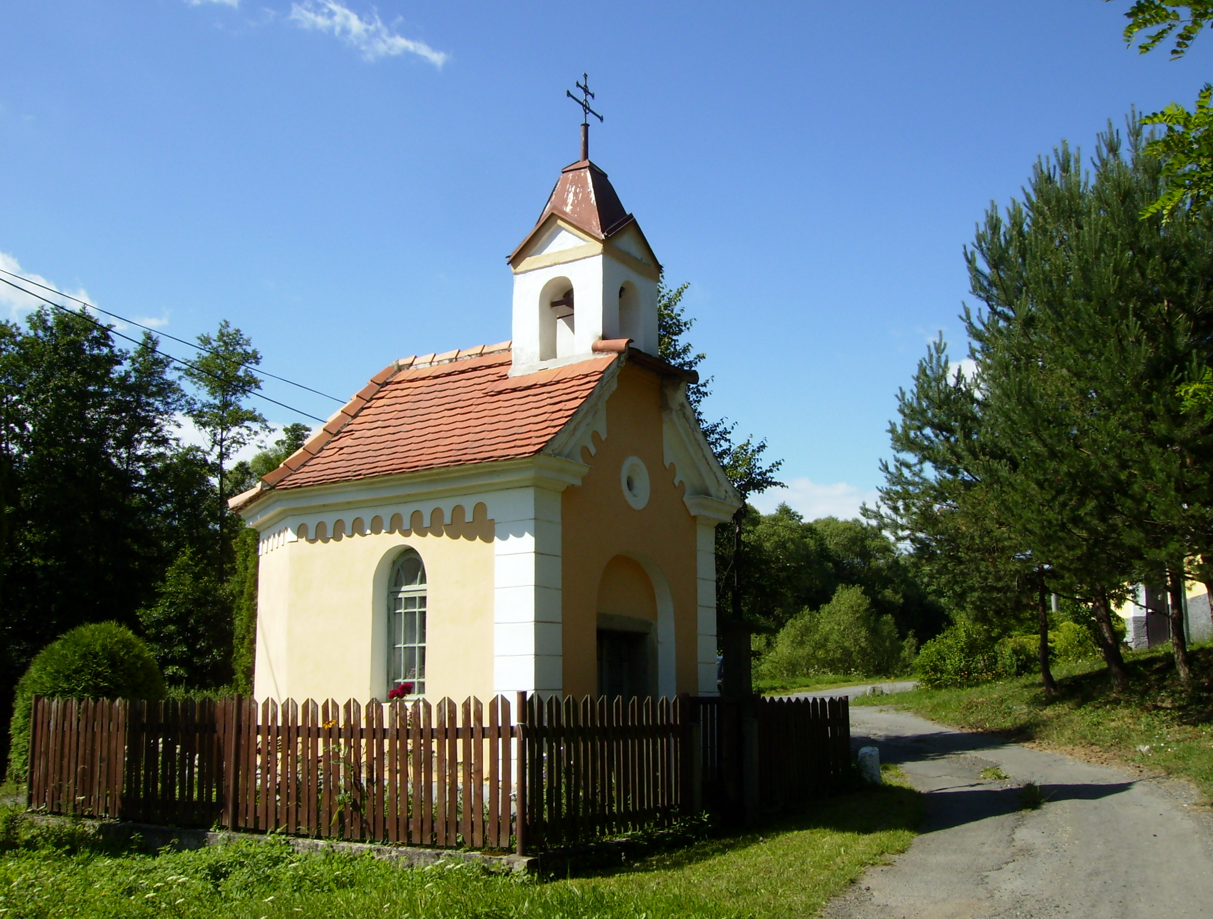 Zvonička v Hostovnici u Krásné Hory nad Vltavou